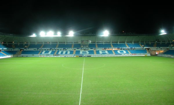 Aker stadion, Norway